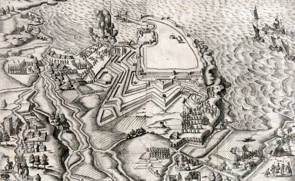 Siege_de_Royan_1622.